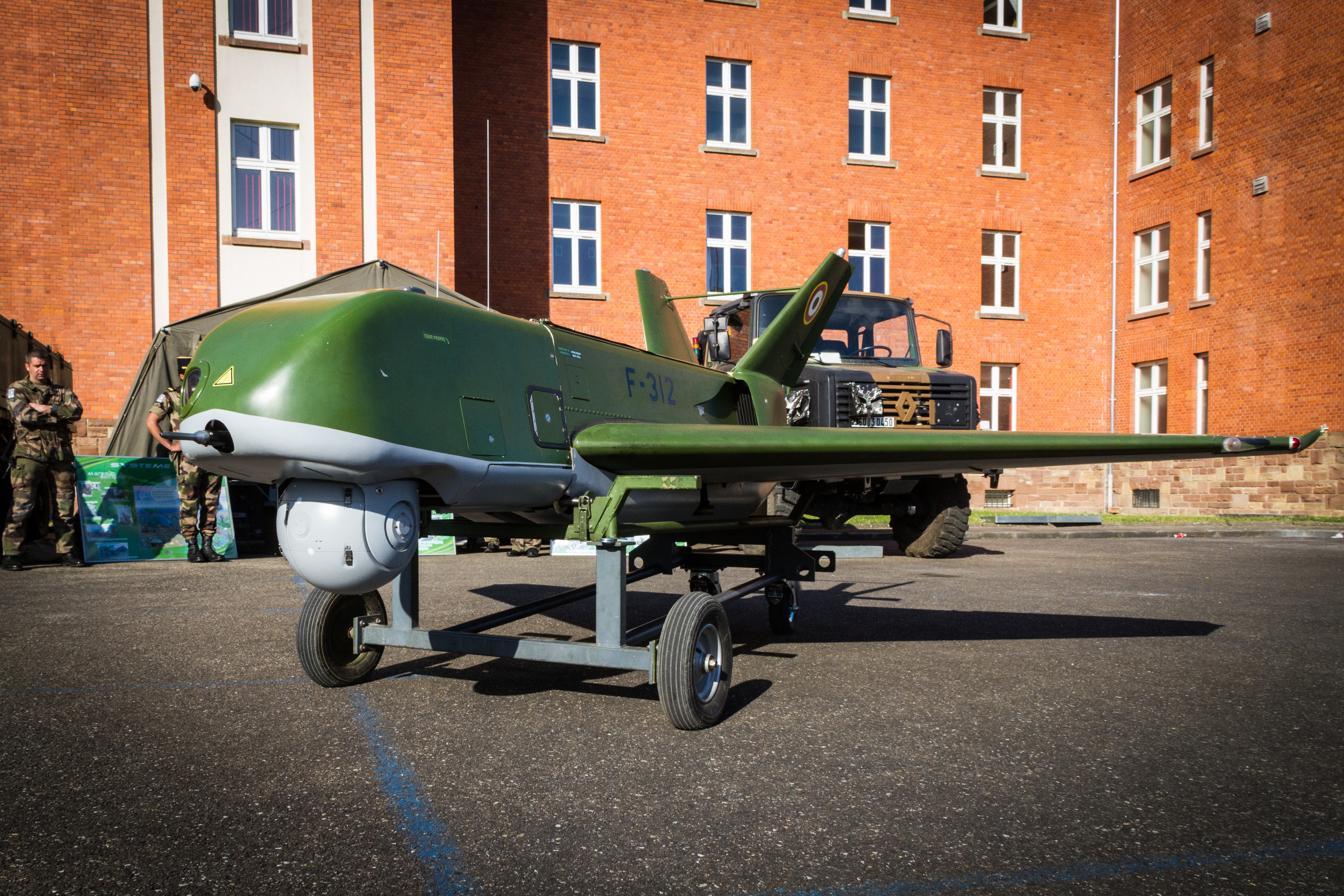 BRIGADEX 2014 Eurocorps Quartier Aubert de Vincelles Strasbourg 15 avril 2014.